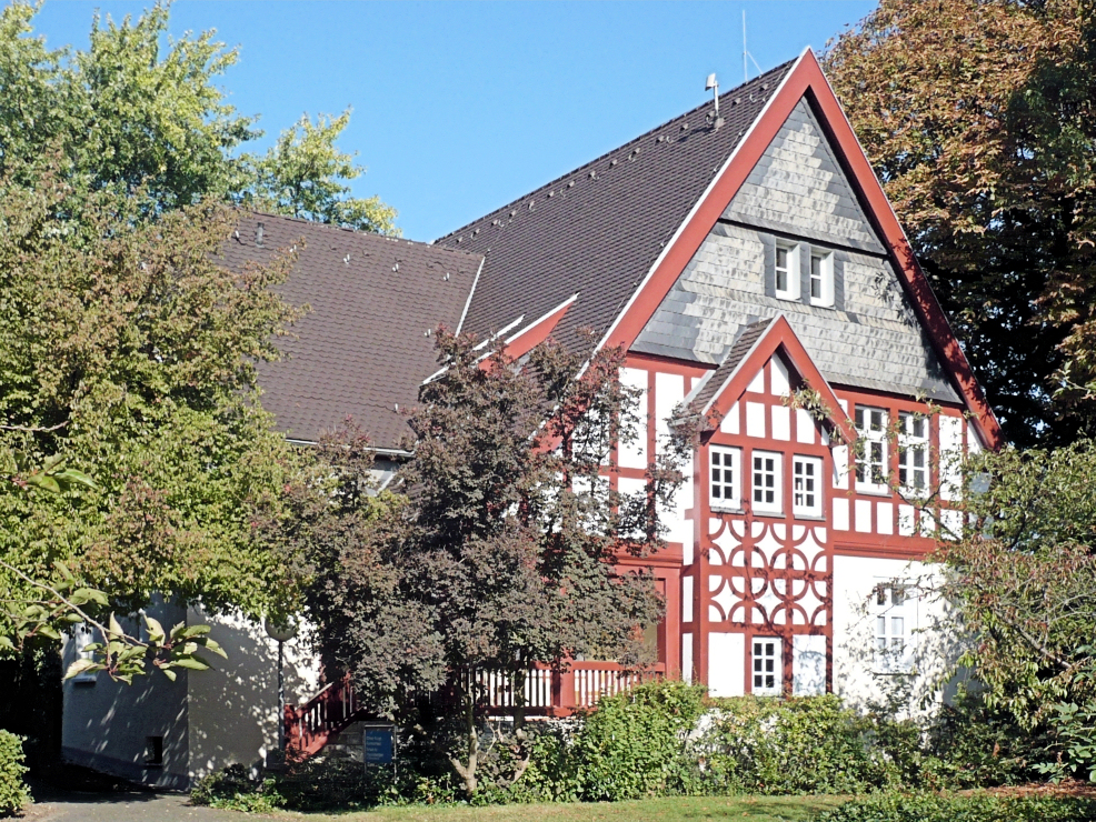 Pfründnerhaus der Siedlung Altenhof I in Essen-Rüttenscheid